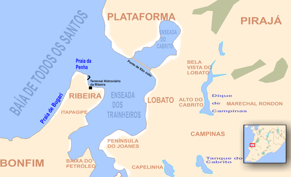 Mapa de Salvador (Bahia, Brazil) - Praias: Bugari e Penha, terminal hidroviário da Ribeira e Ponte de São João.